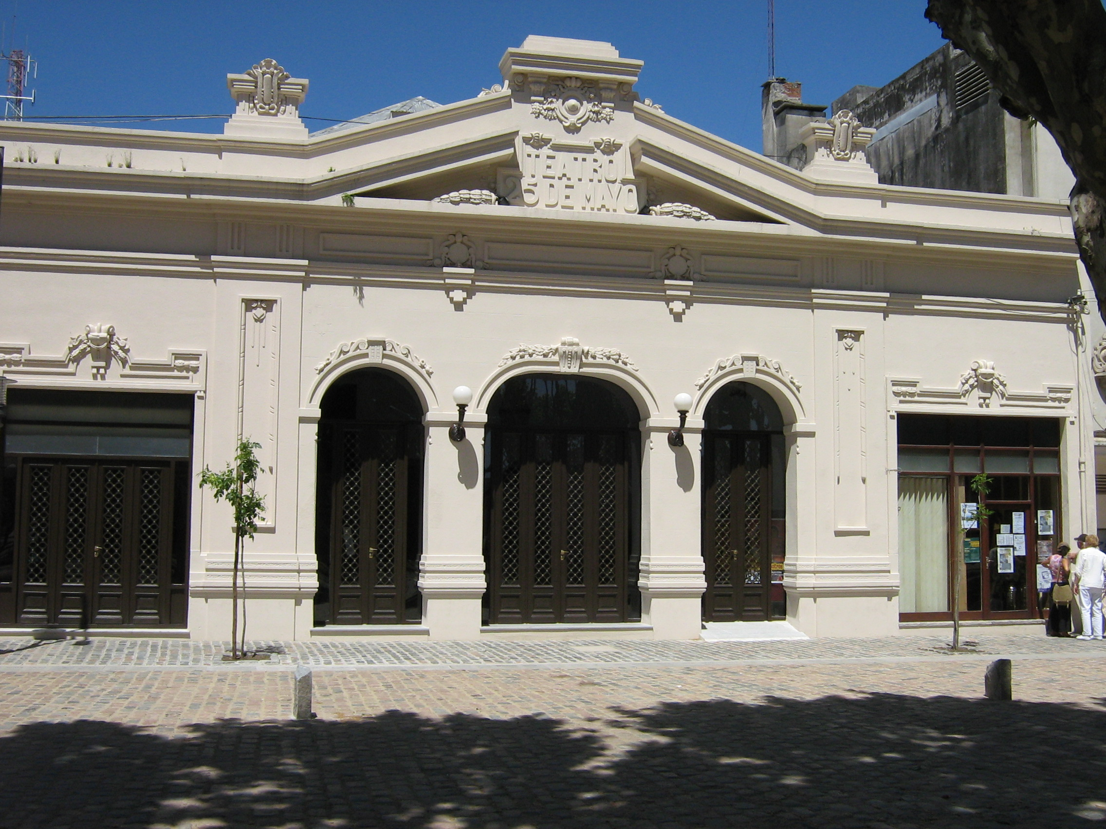 Fachada del teatro 25 de Mayo de la Ciudad de Rocha (Uruguay)